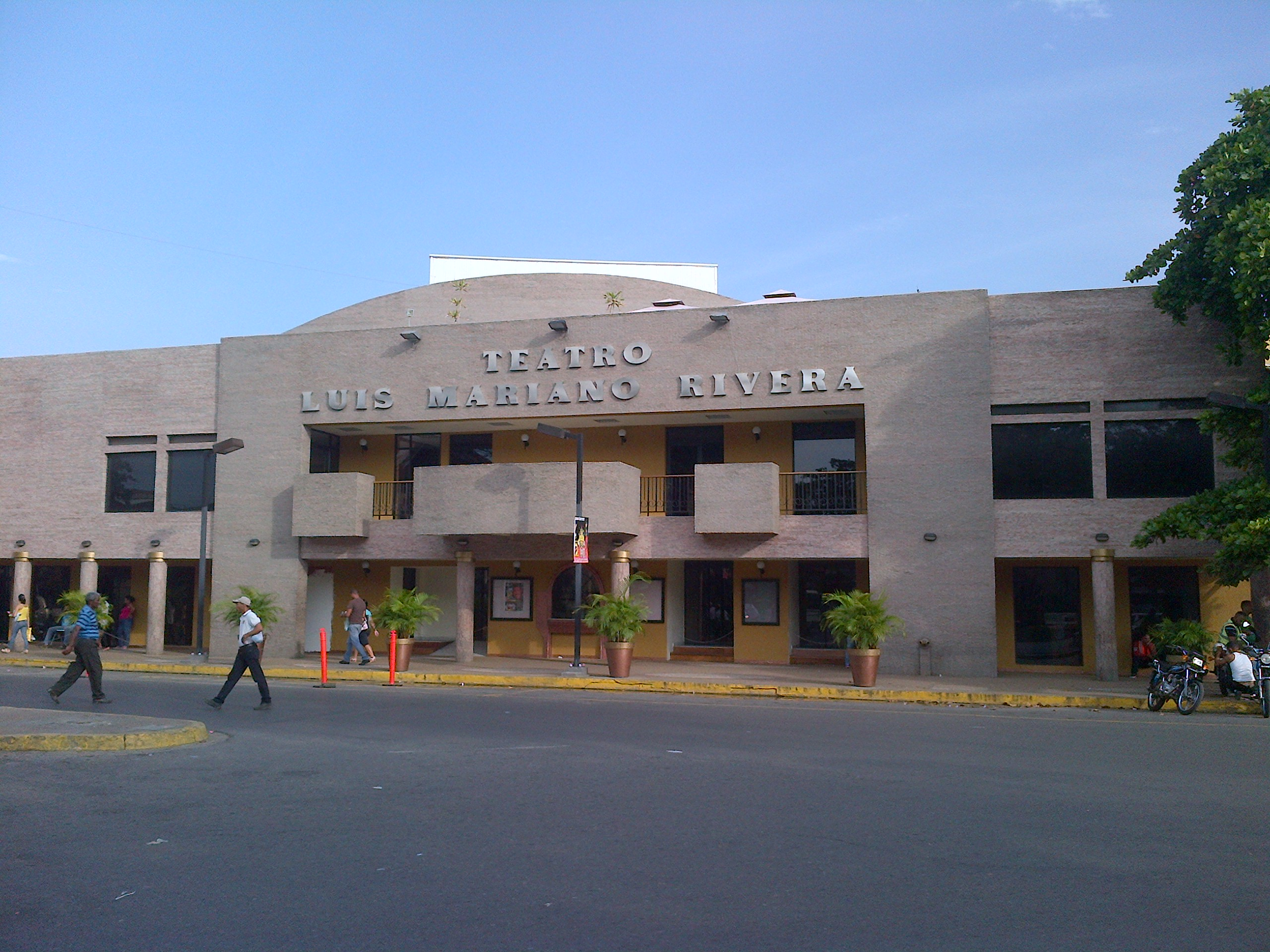 Vista frontal del Teatro Luis Mariano Rivera, en Cumaná, Venezuela.